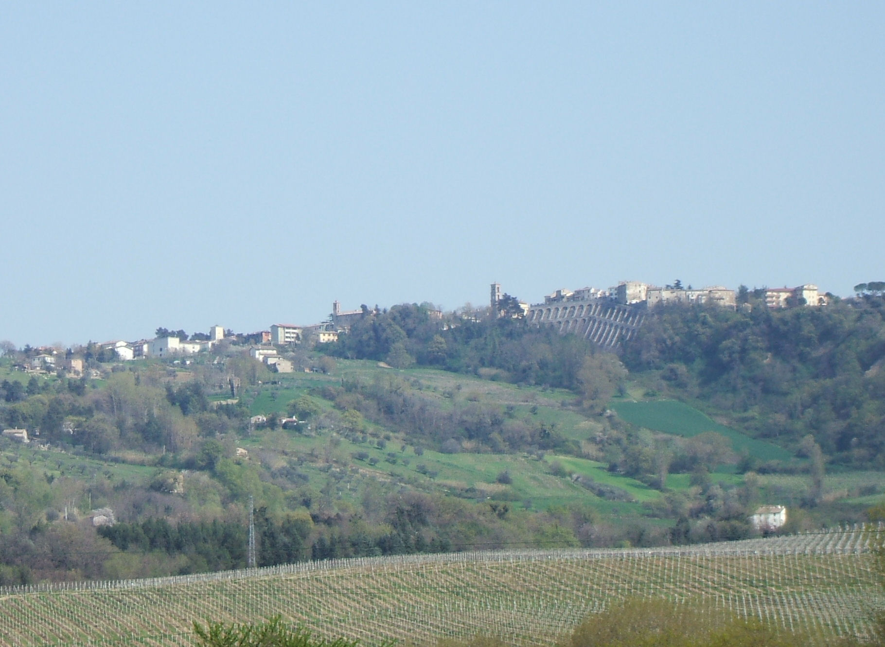 Vista of Maiolati Spontini